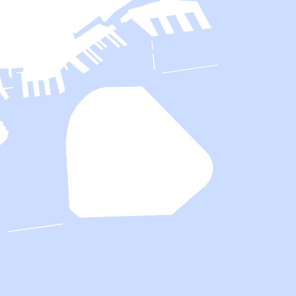 昭和38年ポートアイランド構想図